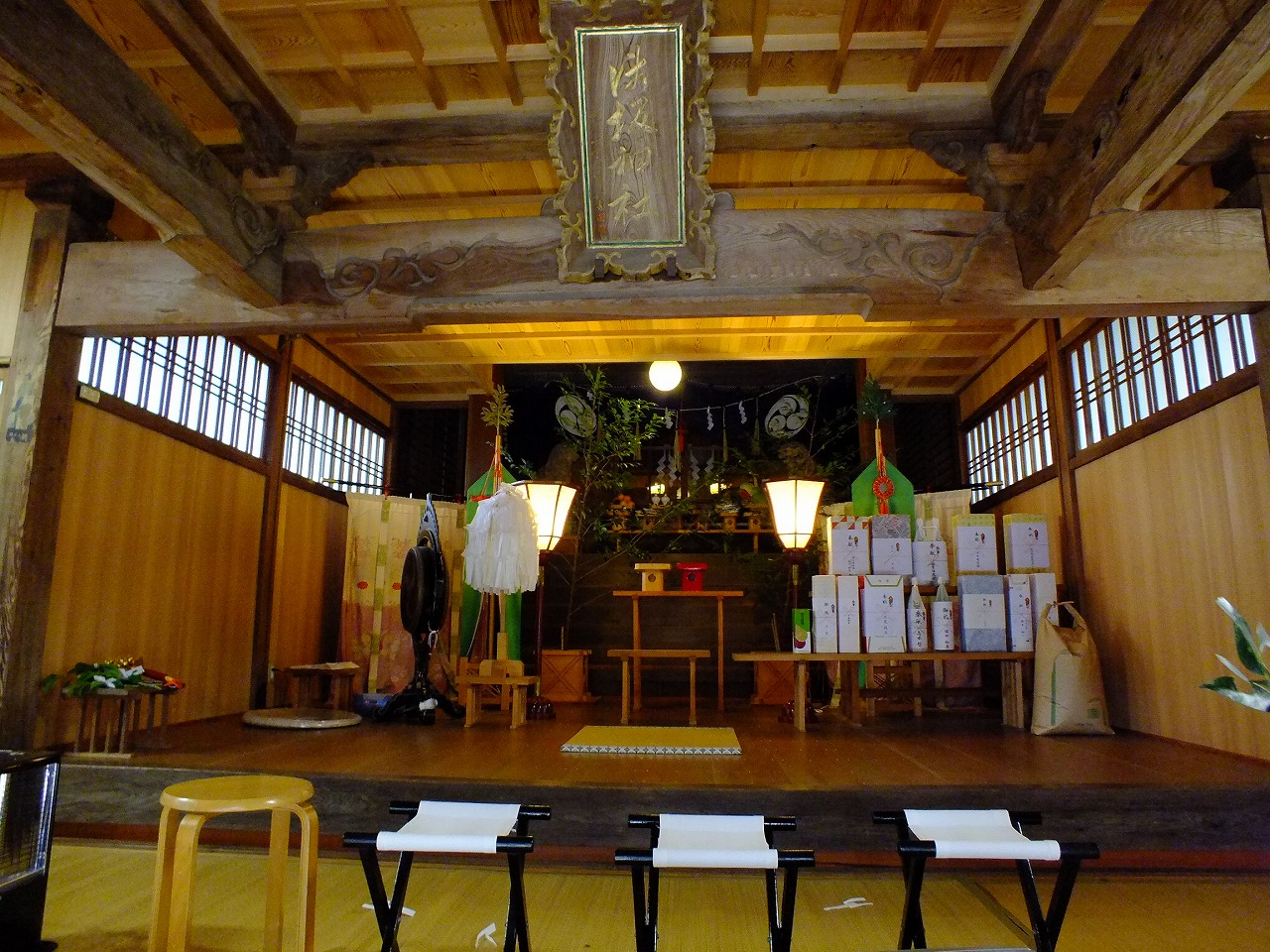 御坂神社拝殿